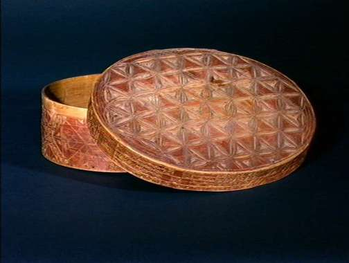 Oval øskje fra Gol i Hallingdal, datert 1779 og dekorert med karveskurd skåret på brunbeiset bunn. Innskrift "MID OA 1778". Lengde 27,5 cm. Foto Anne-Lise Reinsfelt, Norsk Folkemuseum, NF.1922-1142.